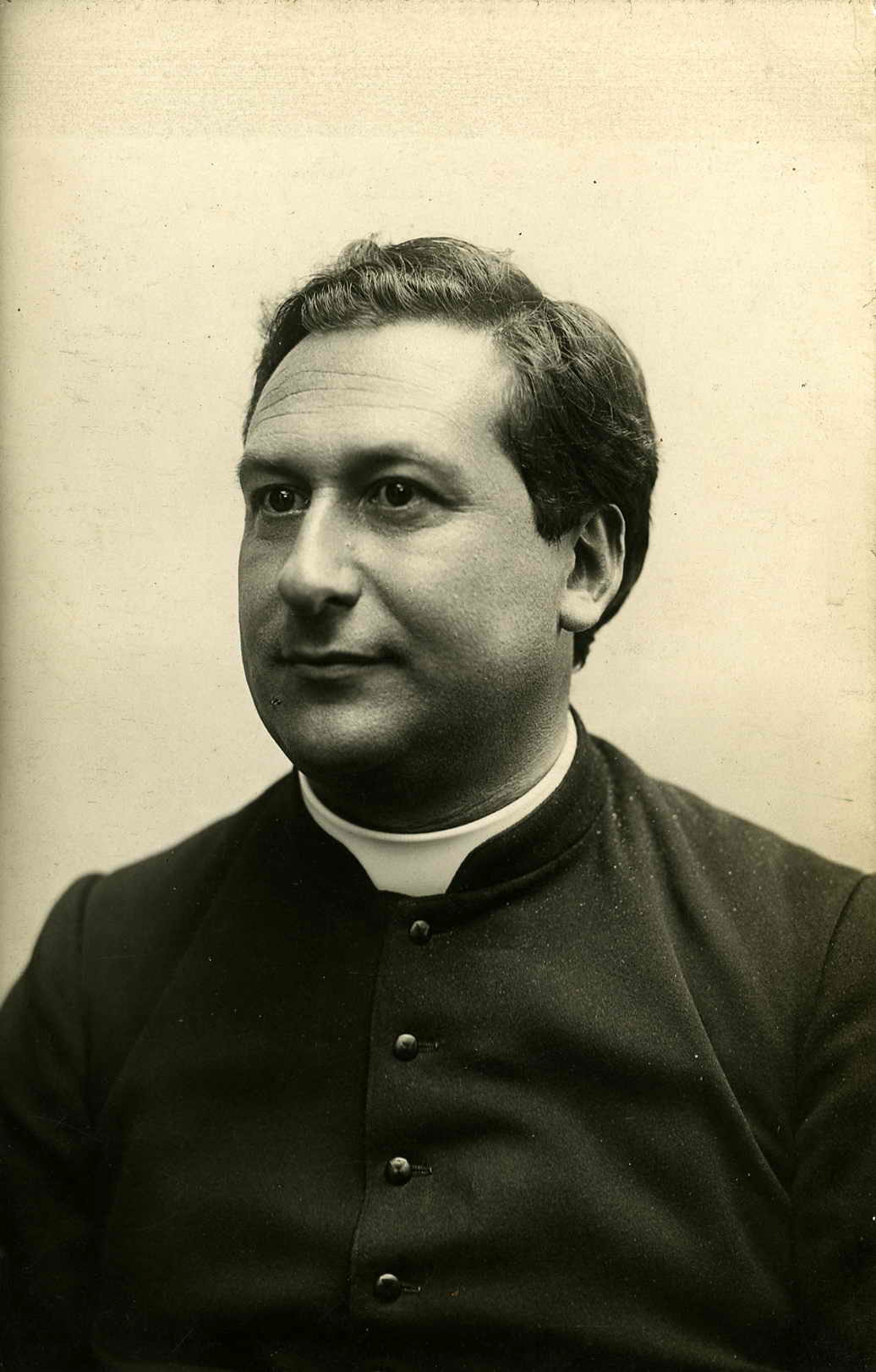 Jacobus Joannes Antonius van Ginneken (1877-1945)